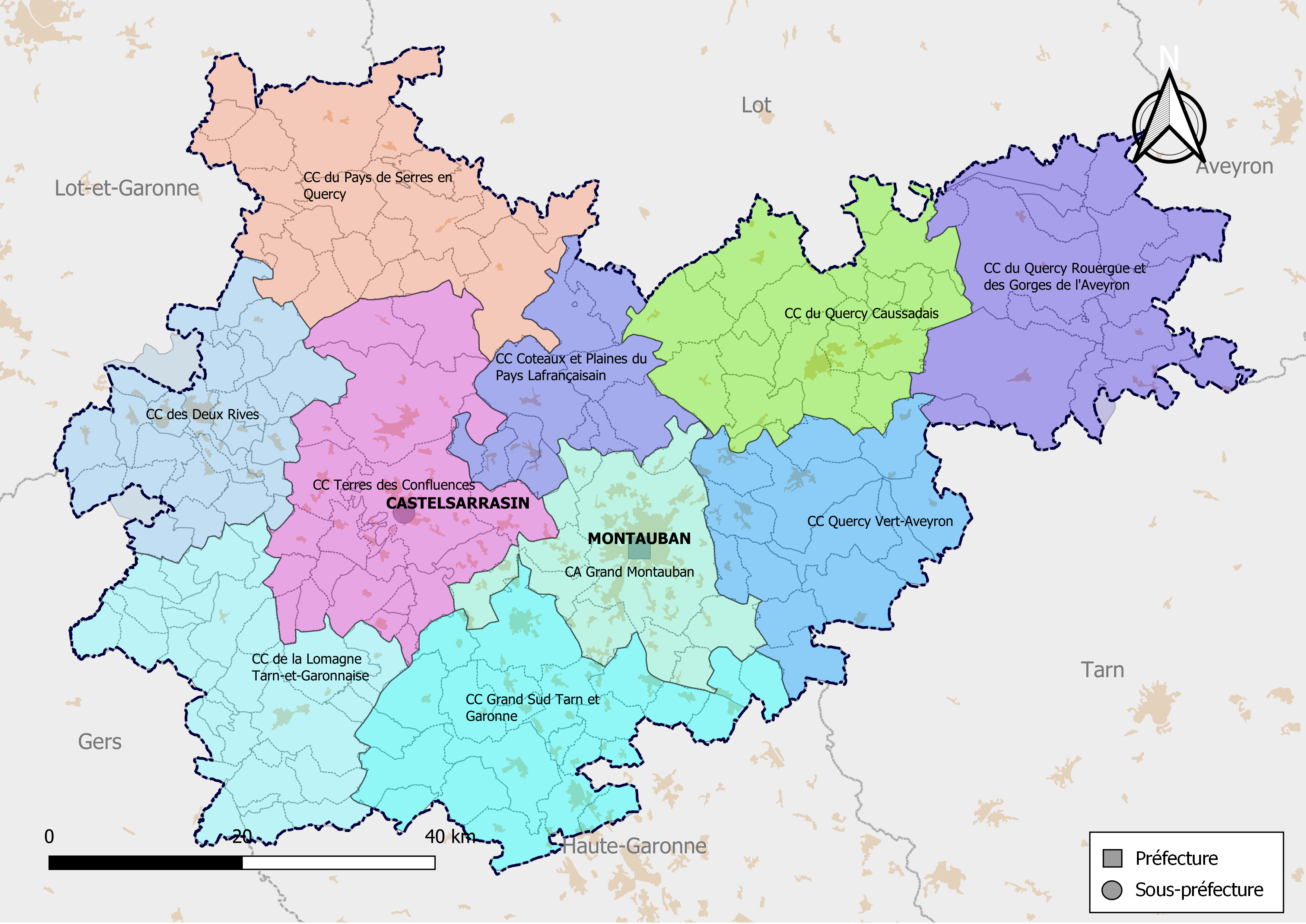 Carte des intercommunalités du département de Tarn-et-Garonne, France. Composition au 1er janvier 2019.